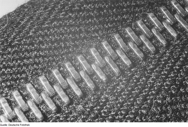 Original image description from the Deutsche Fotothek Reißverschluss